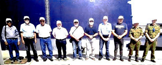 מפקדי שייטת 7 במפגש יובל 60 לשייטת הצוללות מאי 2019